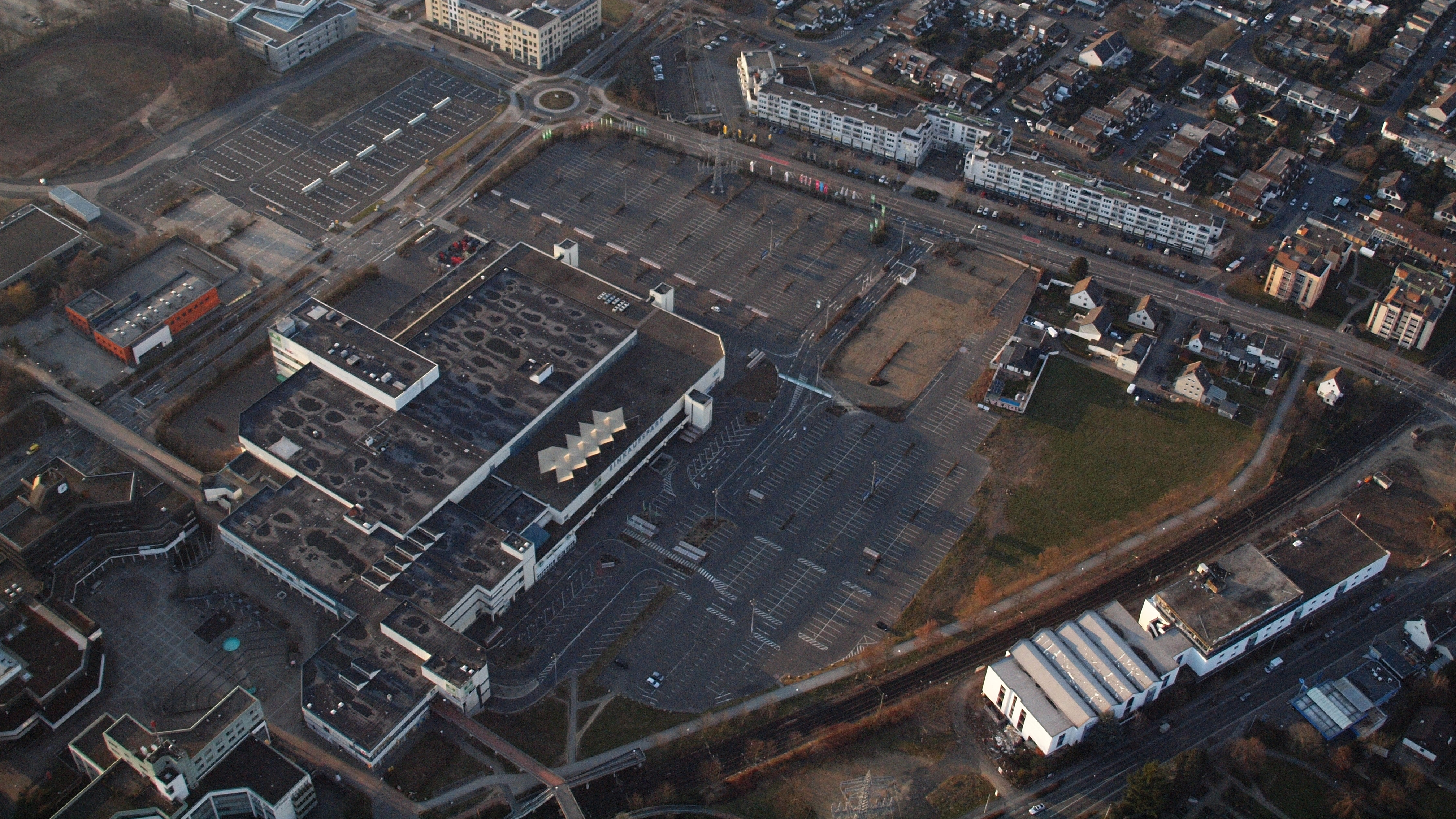 Sankt Augustin, HUMA-Einkaufspark: Luftaufnahme, an einem Ostermontag